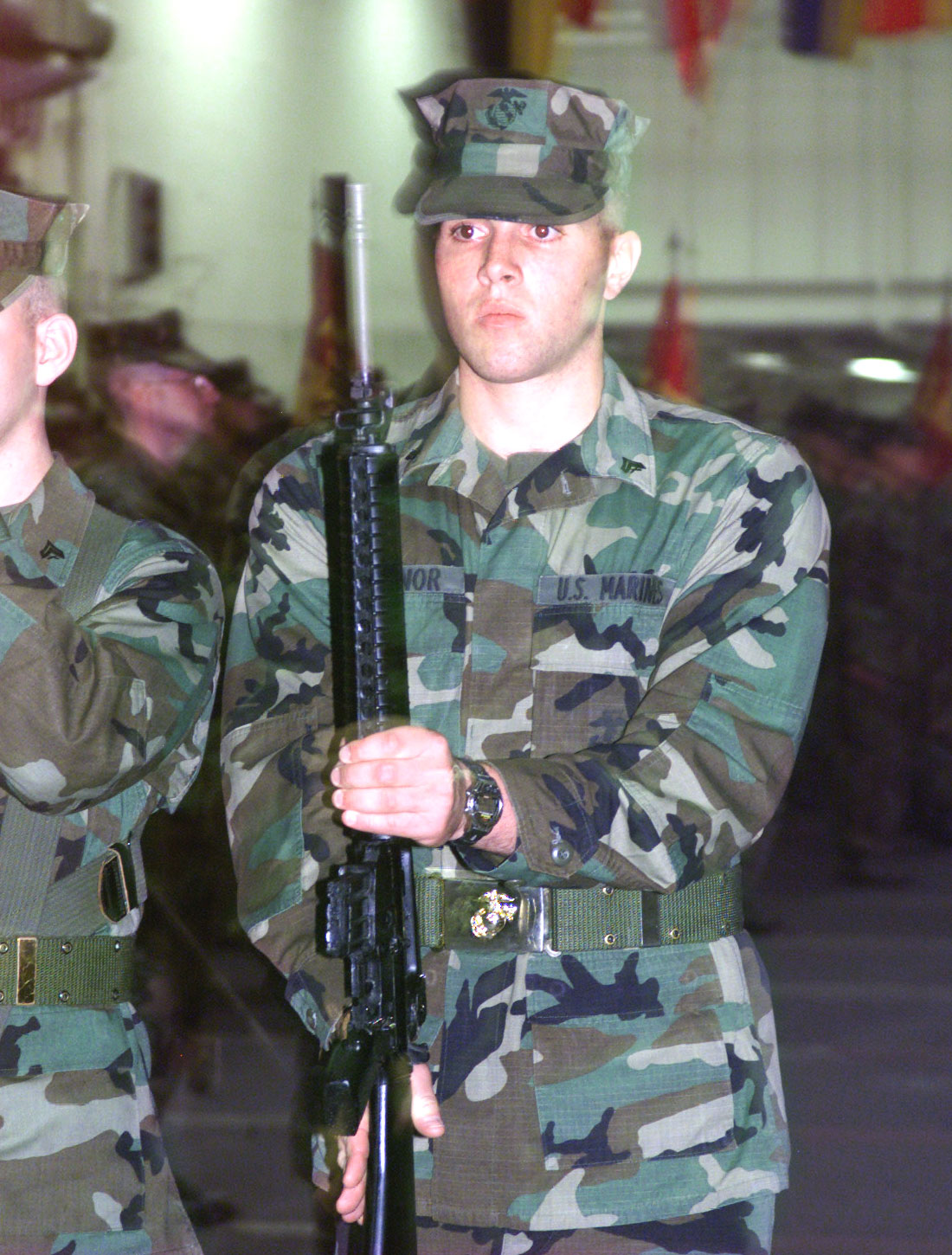 En amerikansk marineinfanterist gjør honnør (presenterer gevær).